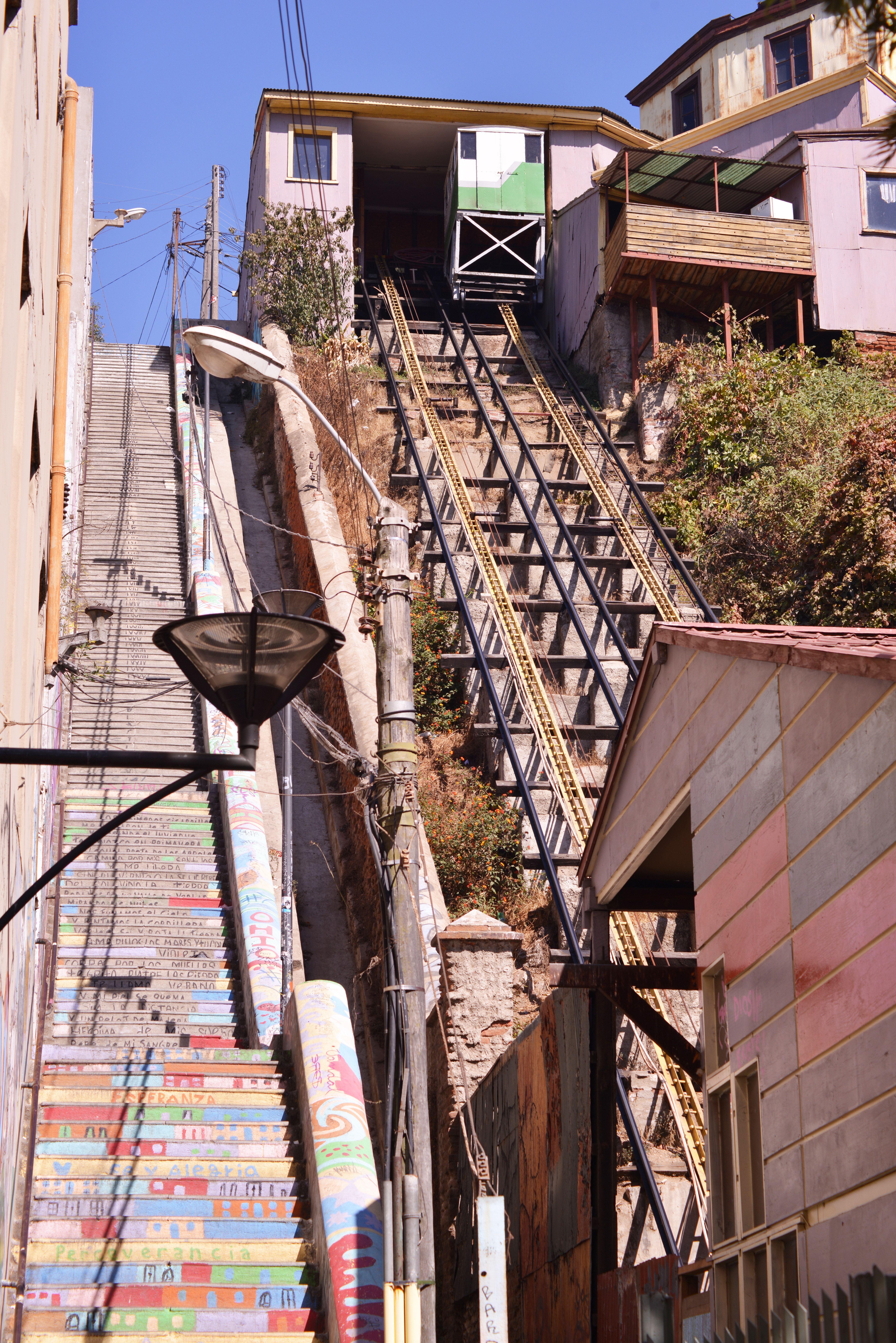 puerto_1